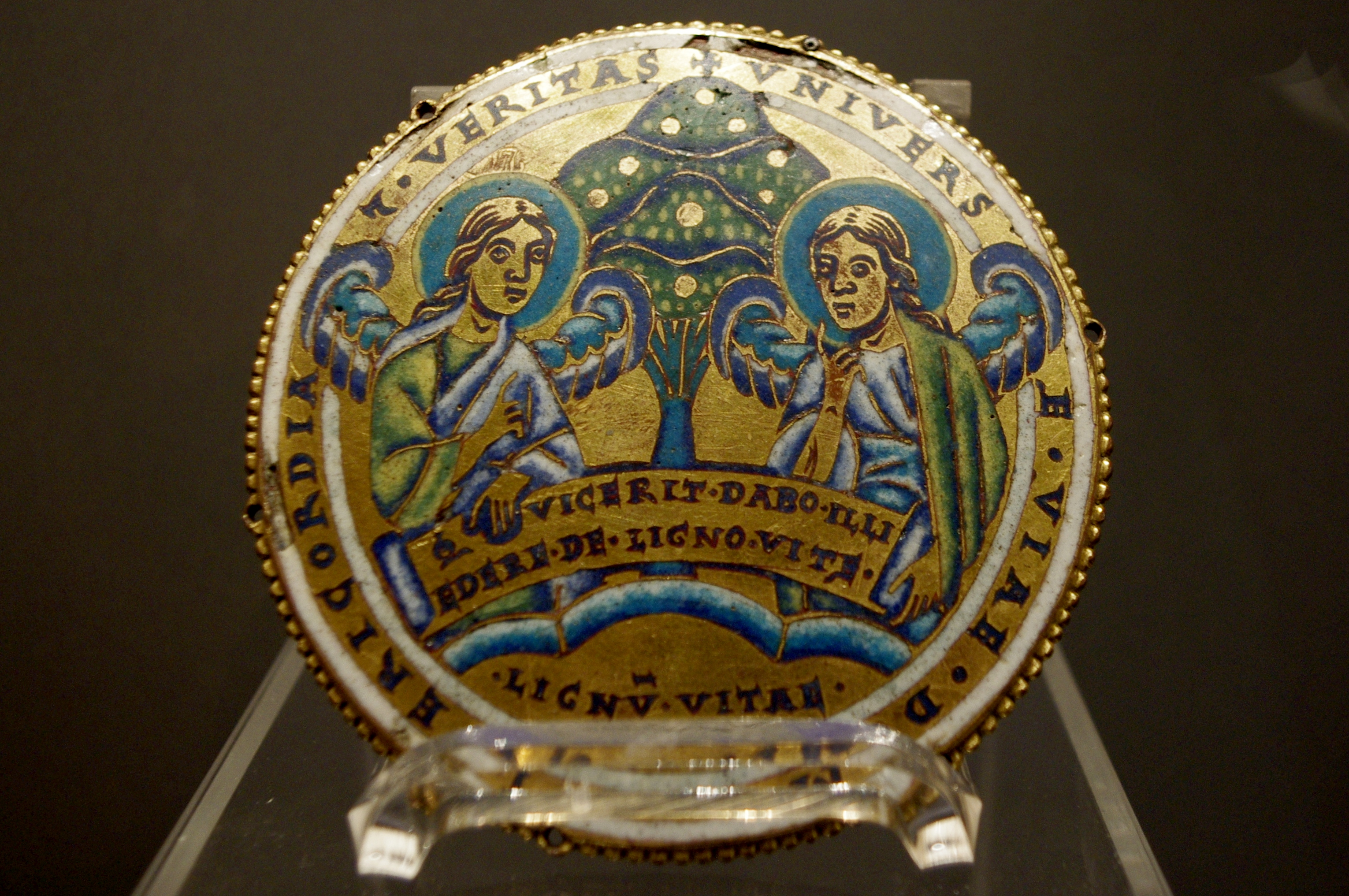 Trésor de la collégiale Notre-Dame, Huy - médaillon émaillé de l'Arbre de Vie, art mosan vers 1160. Inscription sur le pourtour: "Universae viae Domini, misericordia et veritas" (Ps XXIV verset 10), sur le phylactère: "qui vicerit dabo illi edere de ligno vitae" (Apoc. II 7).